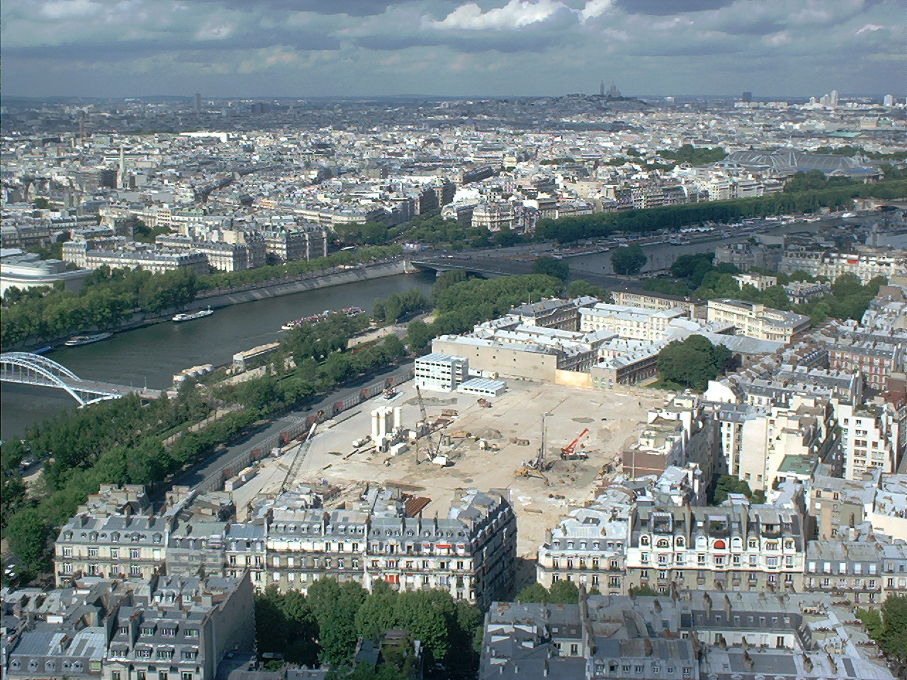 Musée du quai Branly under construction, Paris.